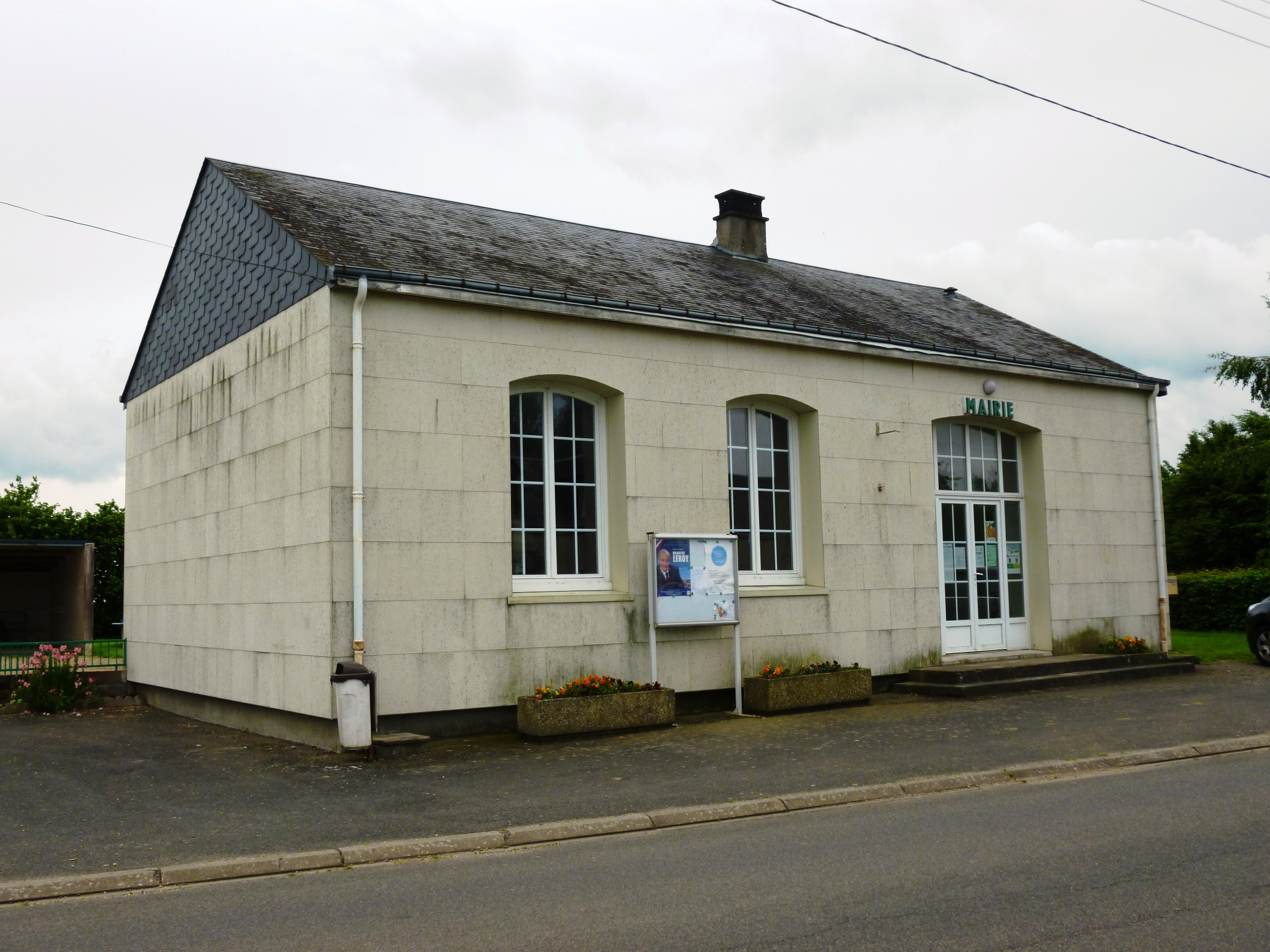 Epiais, sa mairie